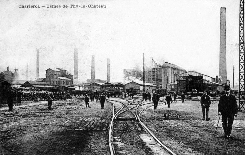 Embranchement industriel et usines vers 1900.